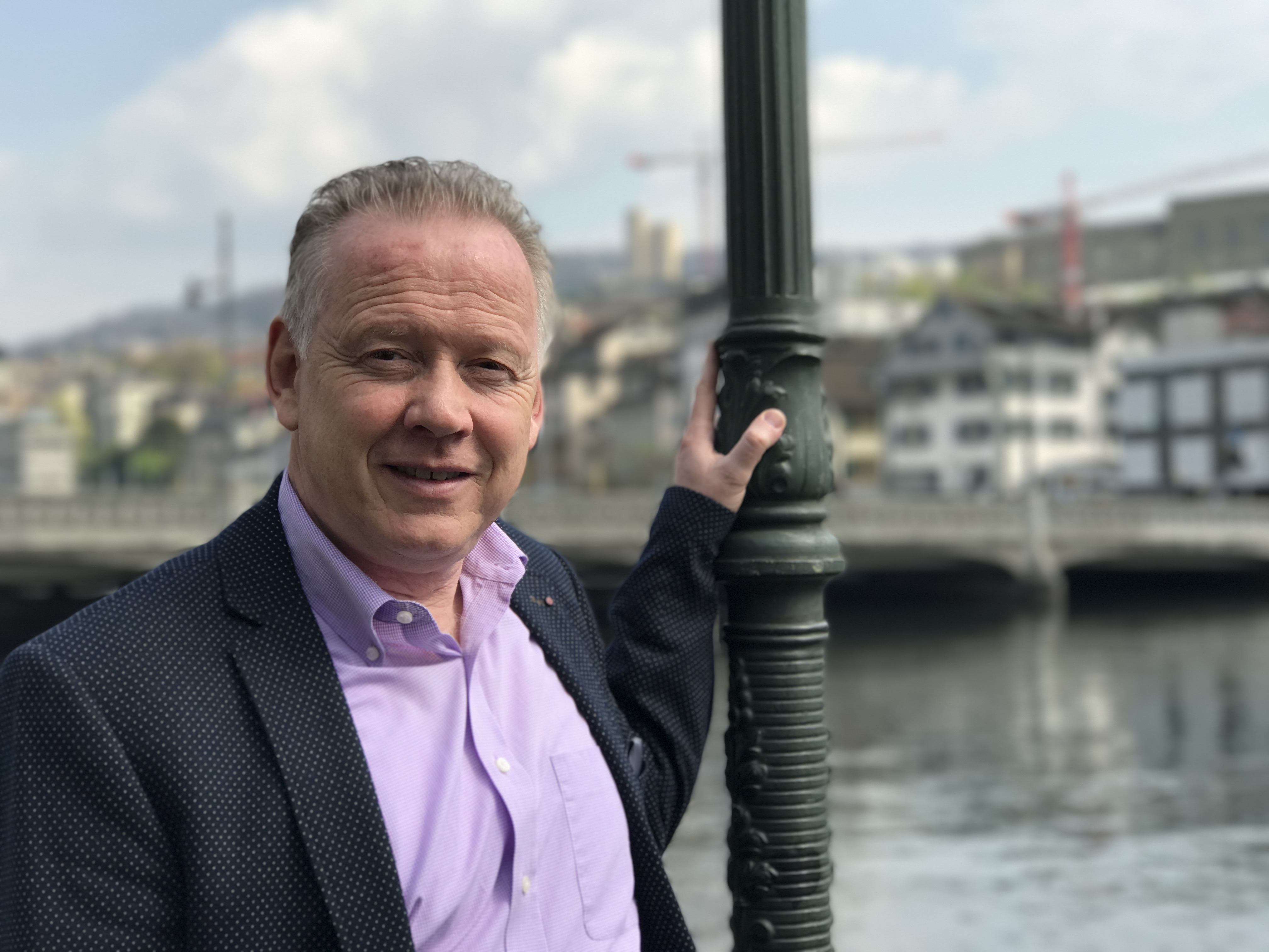 Portrait von Markus Marthaler, Autor, Trainer und Trainer.